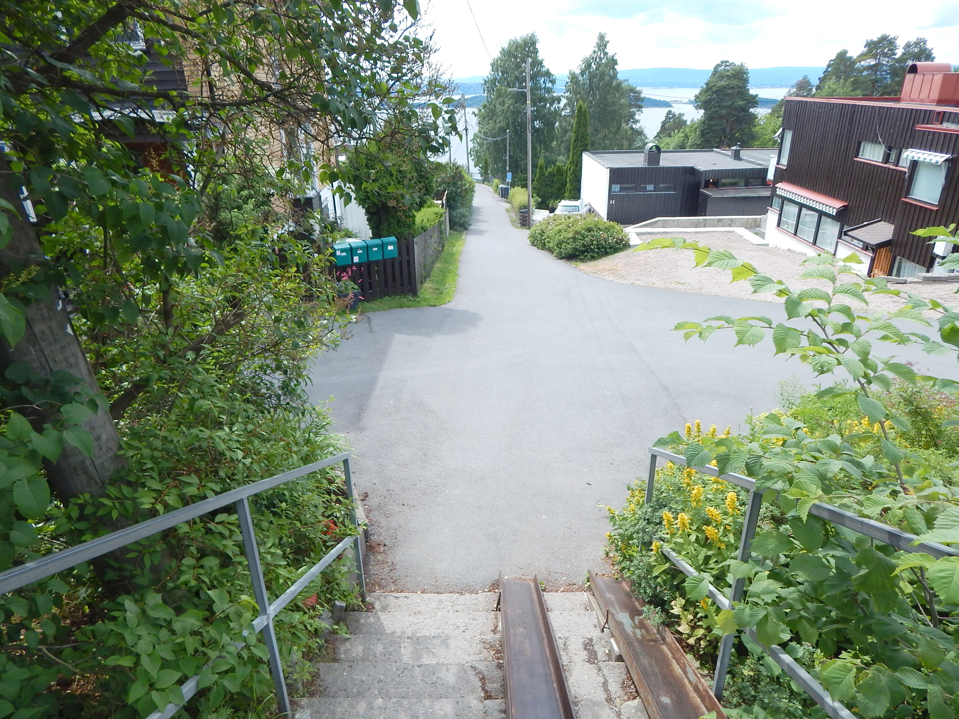 Framveien sett fra Kongsveien